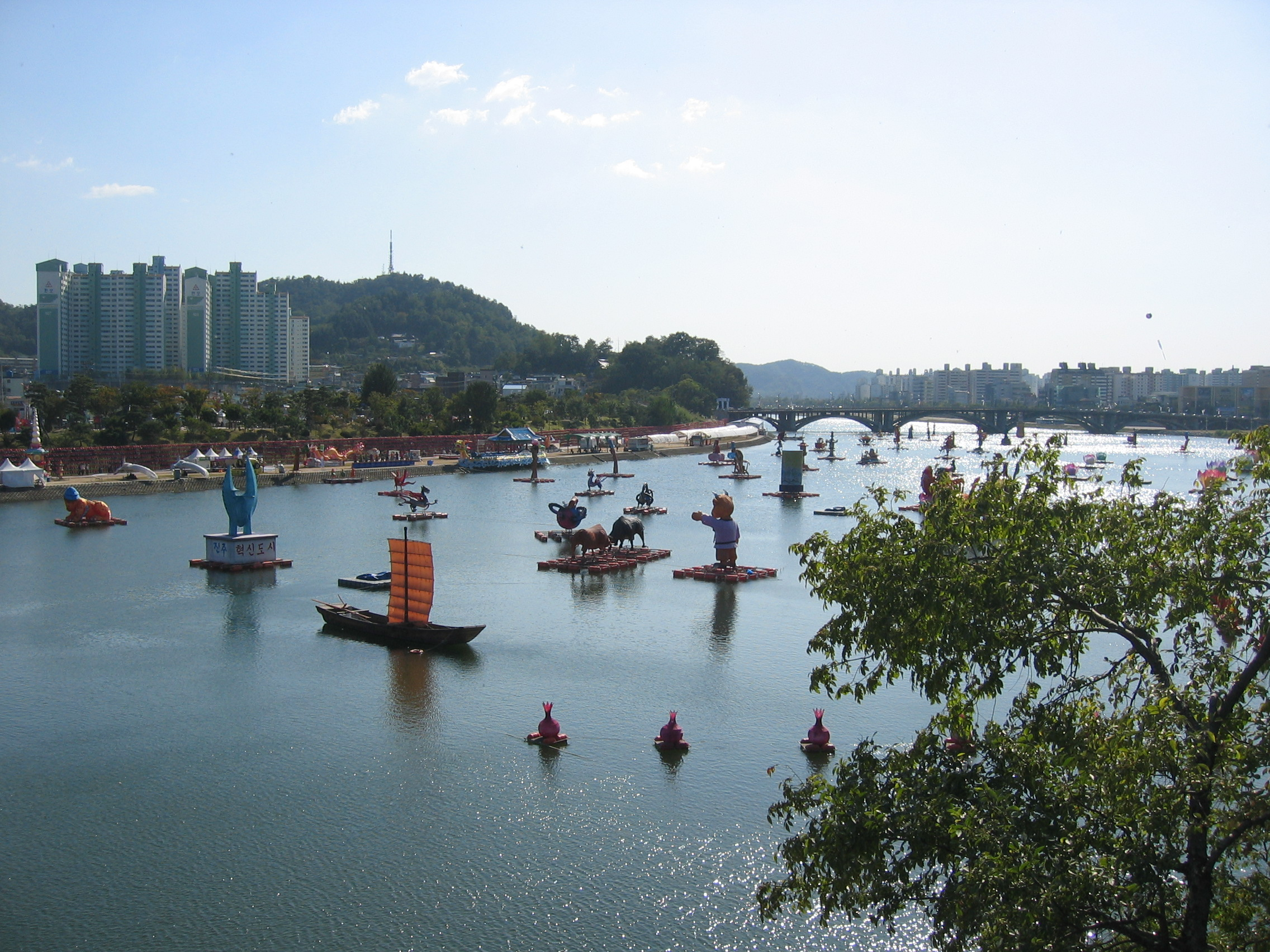 2006년 추석 명절 기간 중 경상남도 진주시 남강에서 열려진 "한국 드라마 페스티벌"의 모습 The scenery of "Korea Drama Festival" being held on Nam River of Jinju, Gyeonsangnam-do, South Korea during Chuseok holidays.